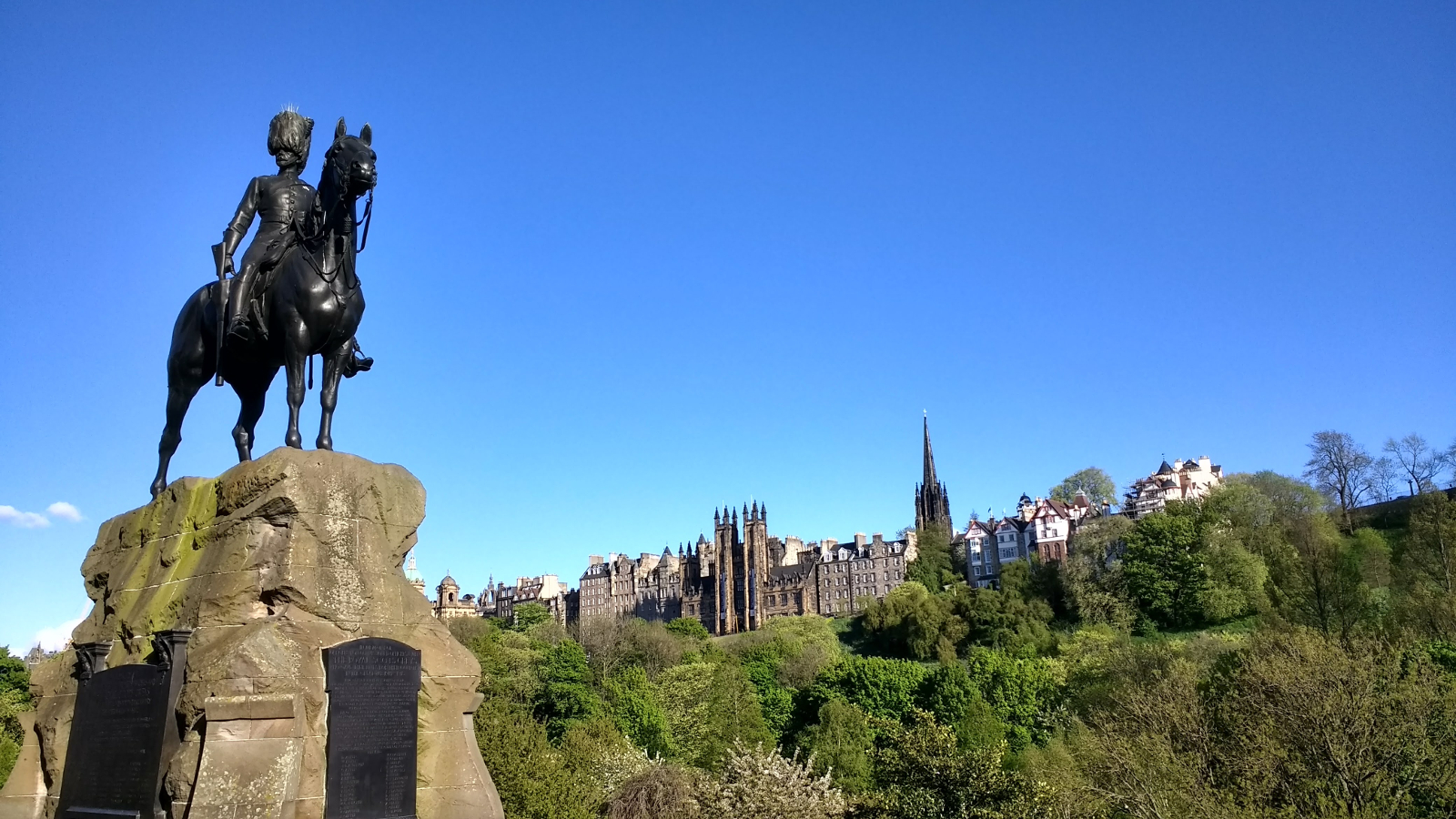 Blick auf die Old Town mit dem New College der University of Edinburgh im Zentrum